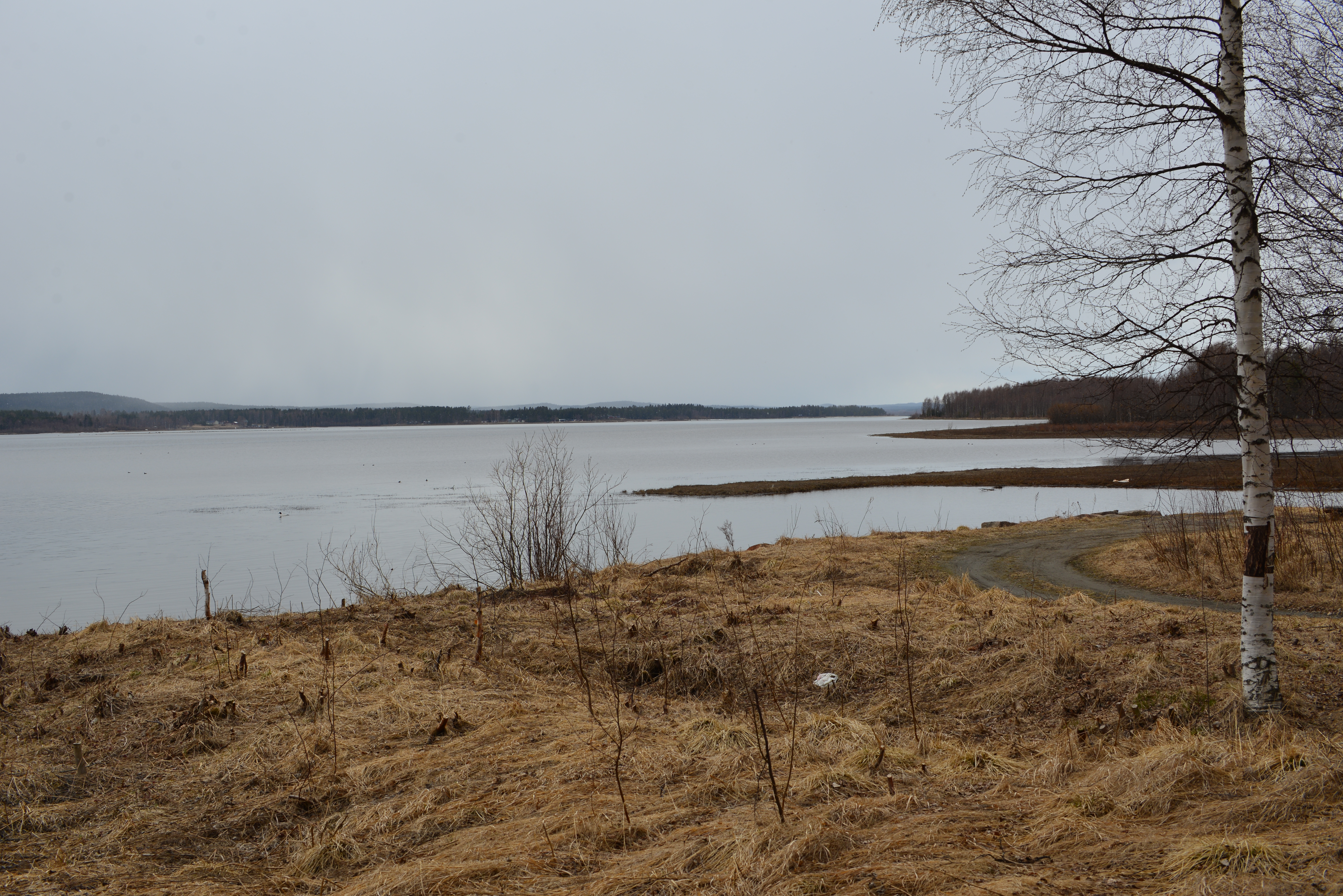 Luleälven, vu vers l'amont à partir de Gammelstad